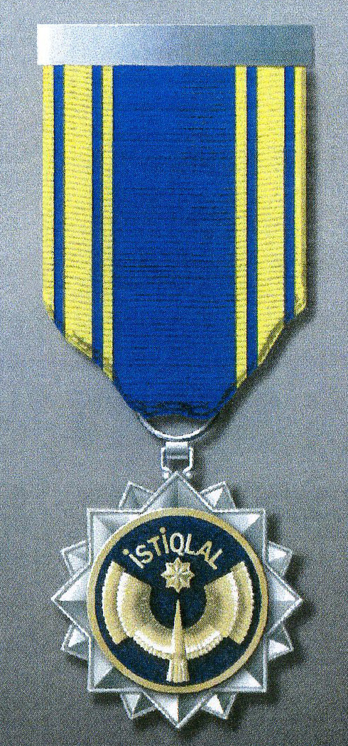 «İstiqlal» ordeni